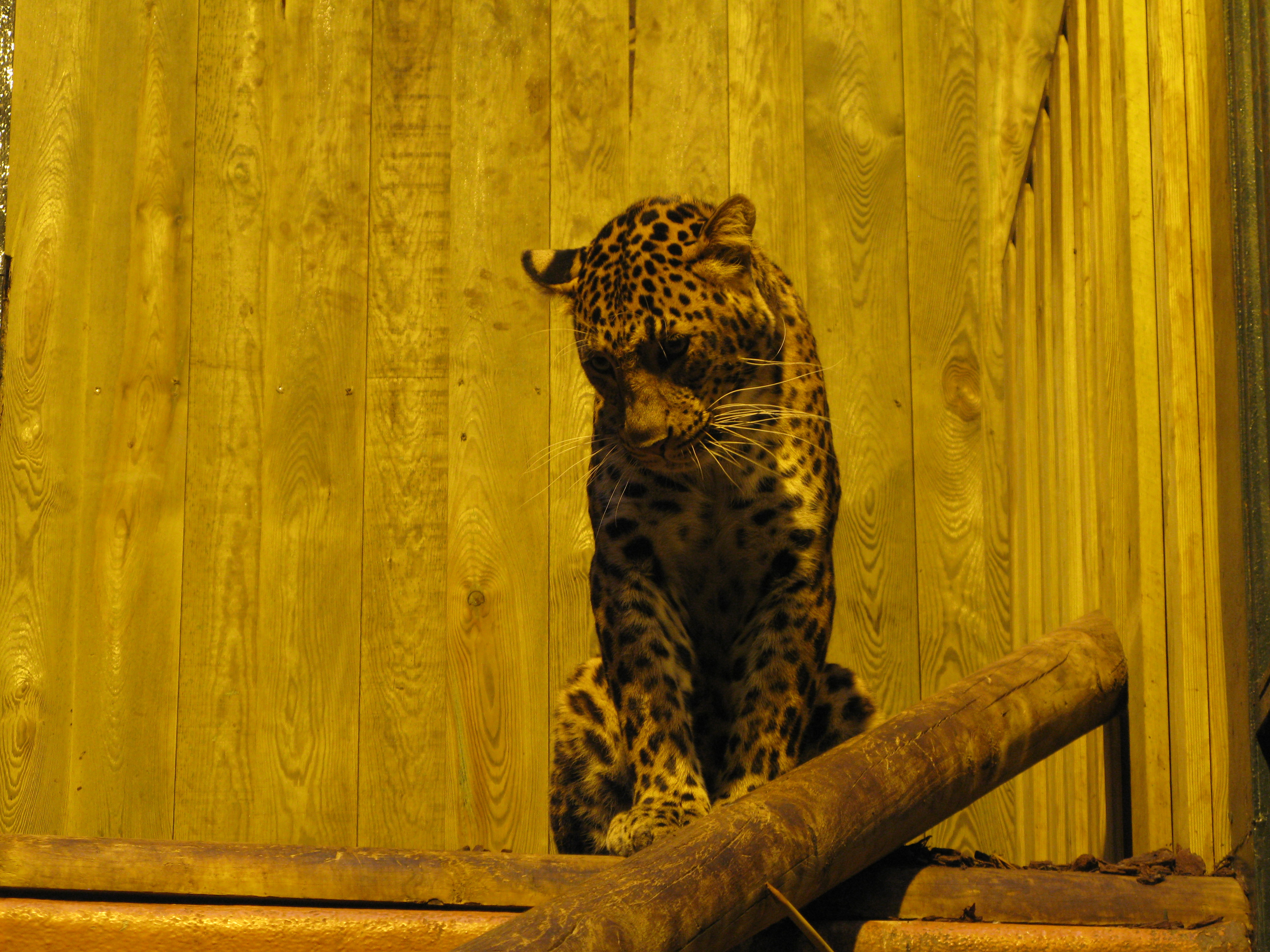 Panthère de Chine du Nord (panthera pardus japonensis), ménagerie du Jardin des Plantes de Paris.